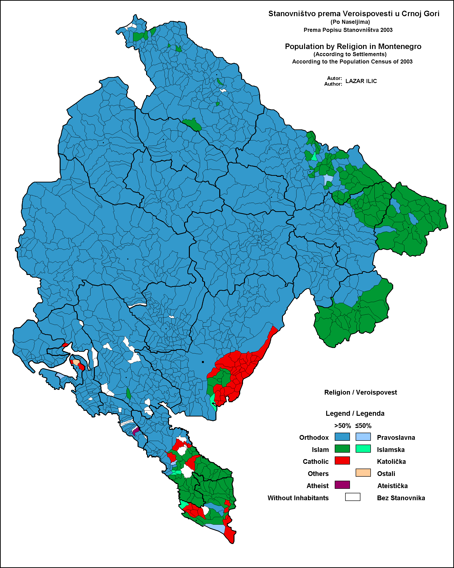 Karta veroispovesti u crnoj gori prema popisu stanovnistva iz 2003e godine. Ako imate pitanja u vezi karte mozete kontaktirati Lazara Ilica na